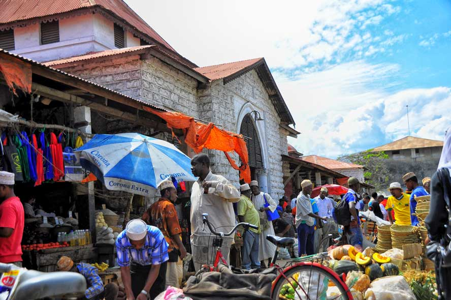 Zanzibar